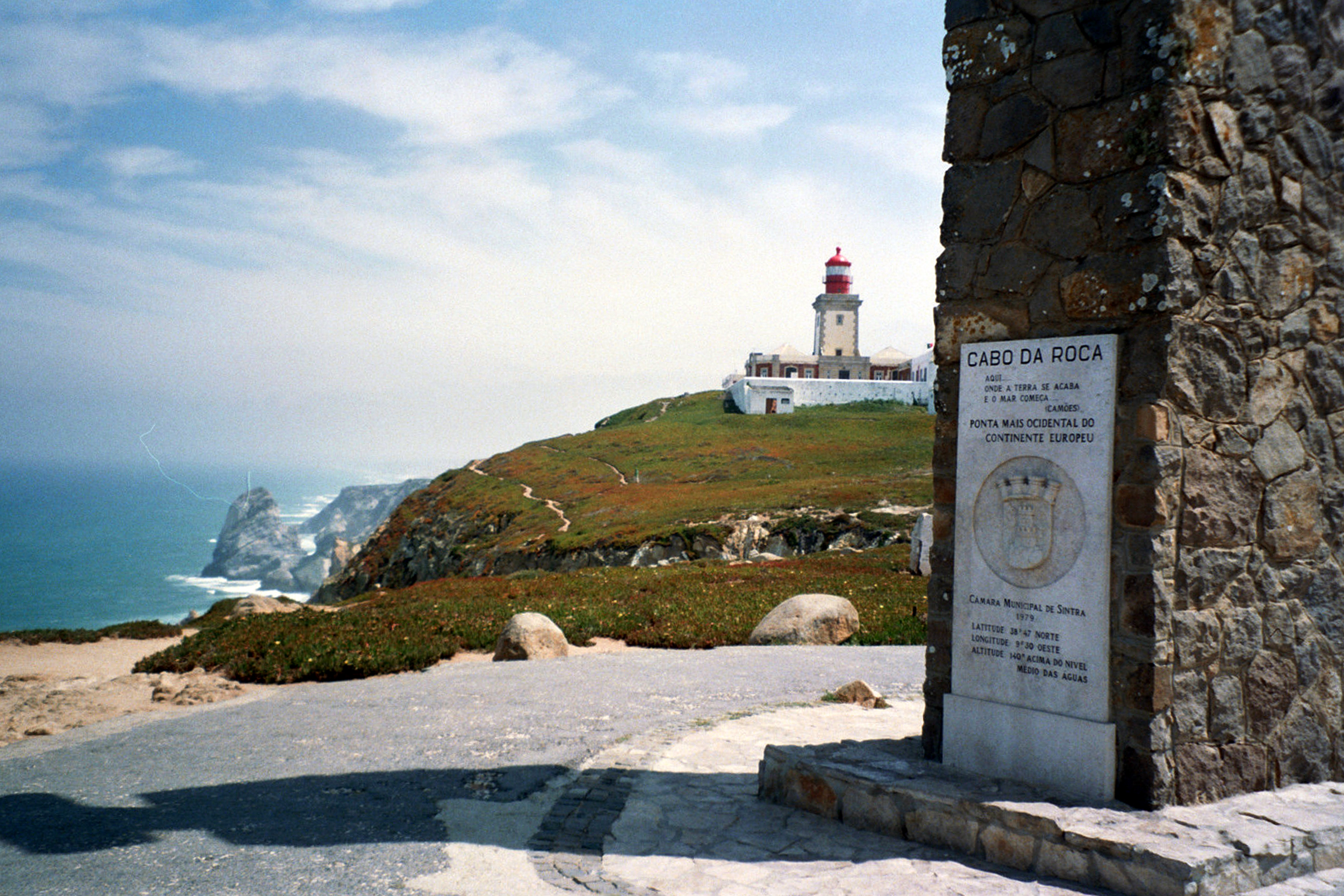 Monument na Przylądku Roca